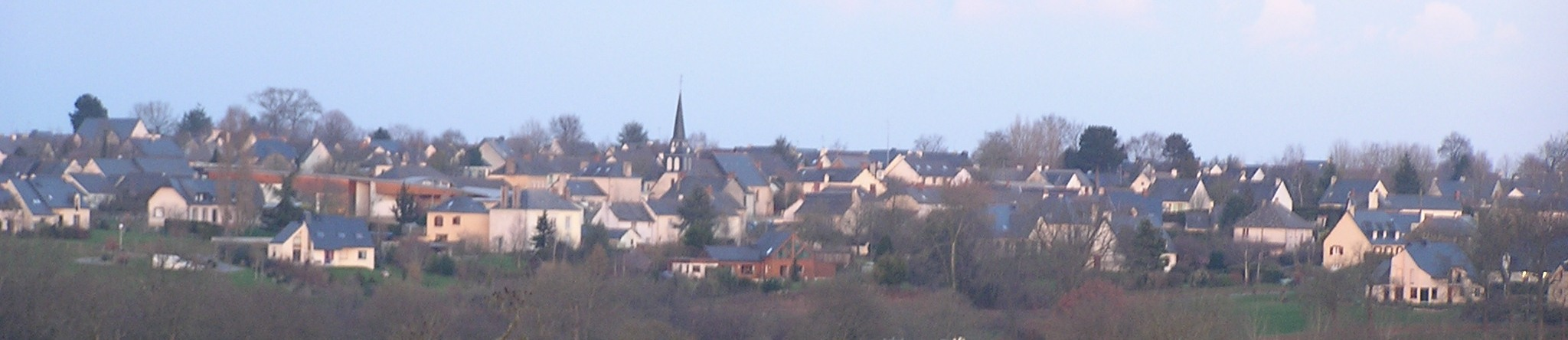 Chevaigné (aperçu)